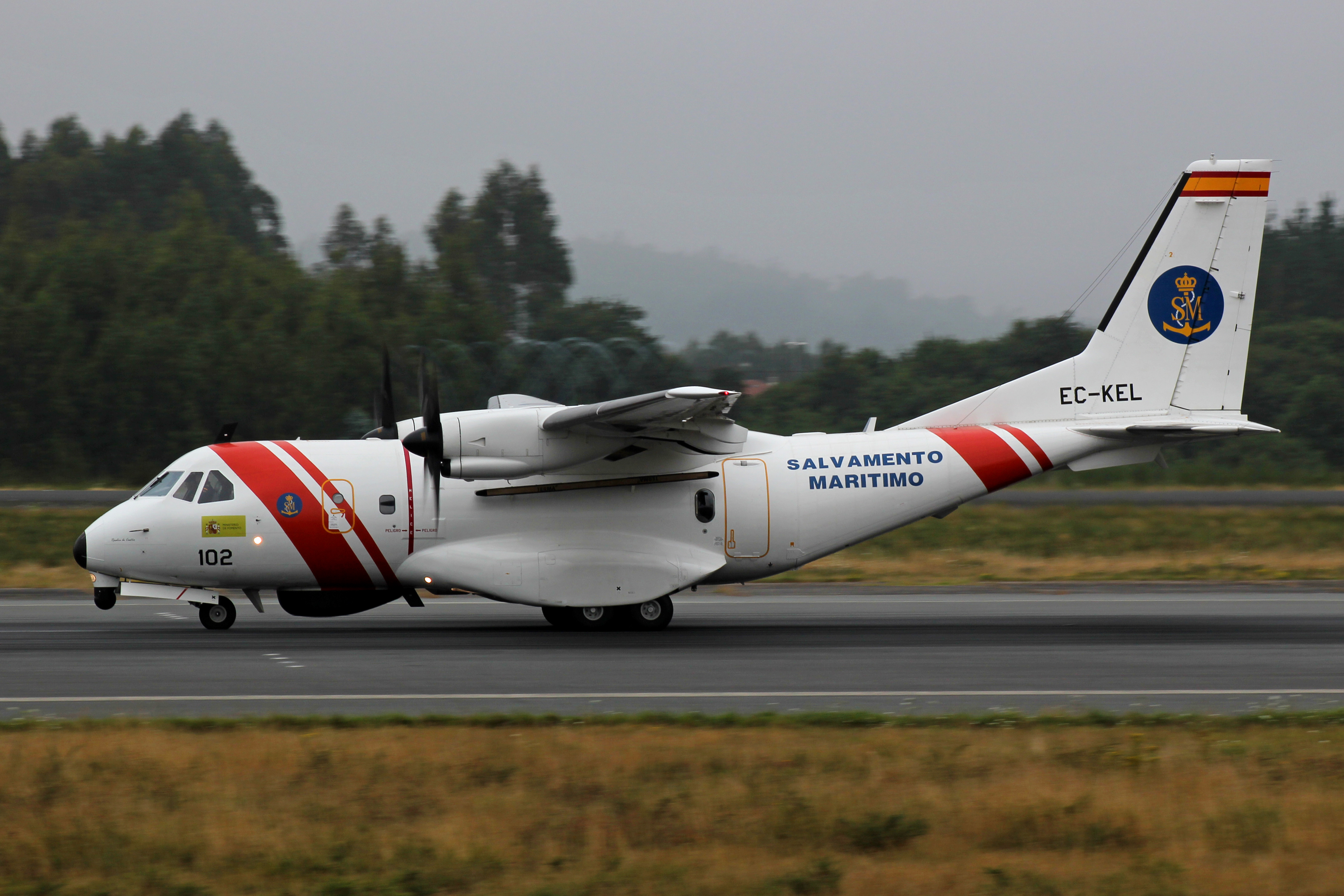 CASA CN-235 de Salvamento Marítimo despegando do aeroporto de Santiago de Compostela.